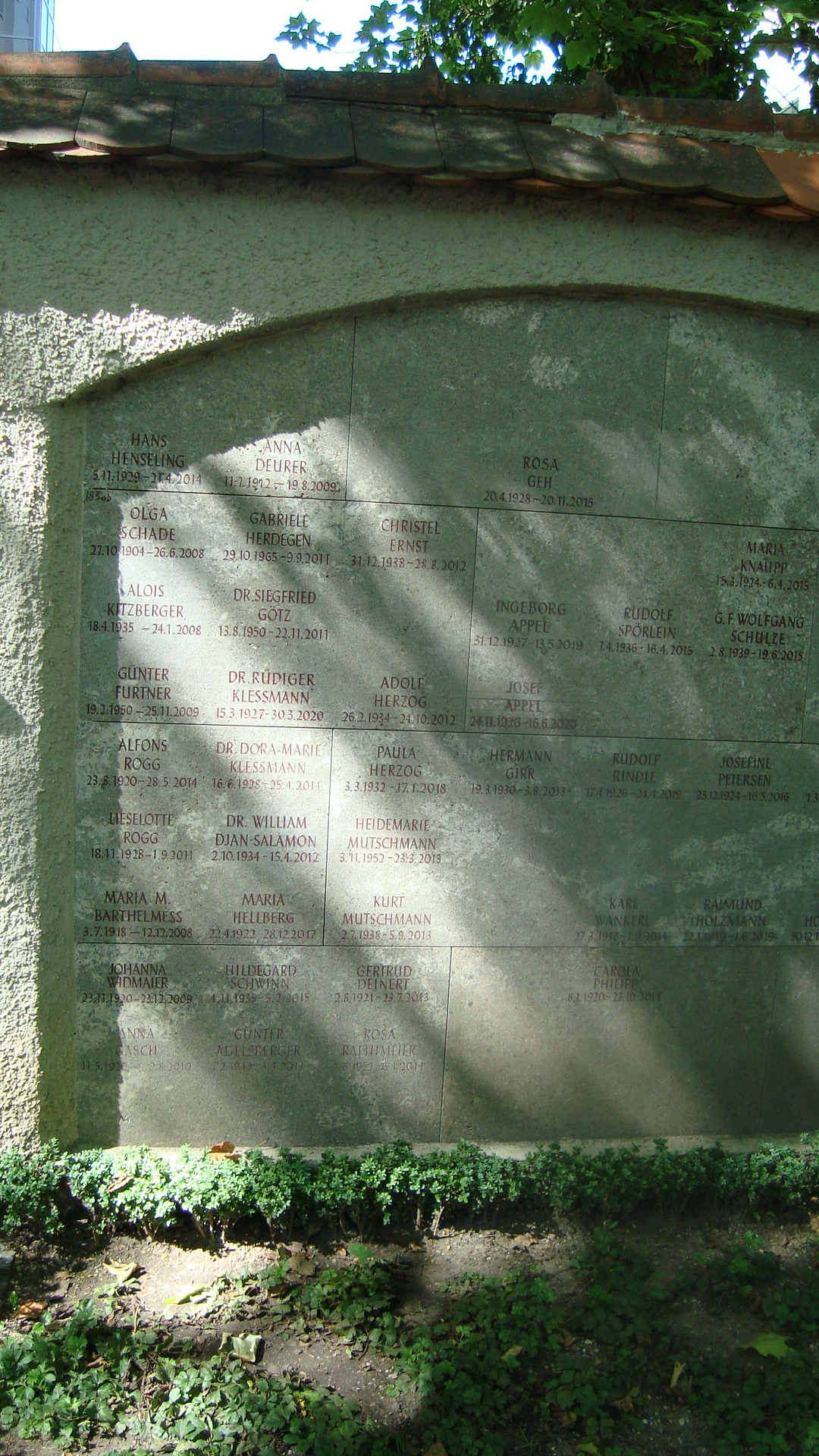 Grab Rüdiger Klessmann 2020 auf dem Katholischen Friedhof an der Hermanstraße in Augsburg